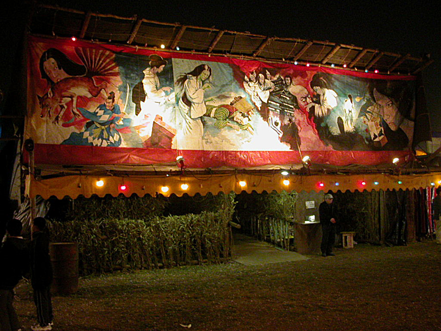 撮影者：小太刀 お化け屋敷（移動式） 祭の屋台に並んでいたお化け屋敷で遊園地にあるものとは違います。中央が入り口で向かって右側が出口です。